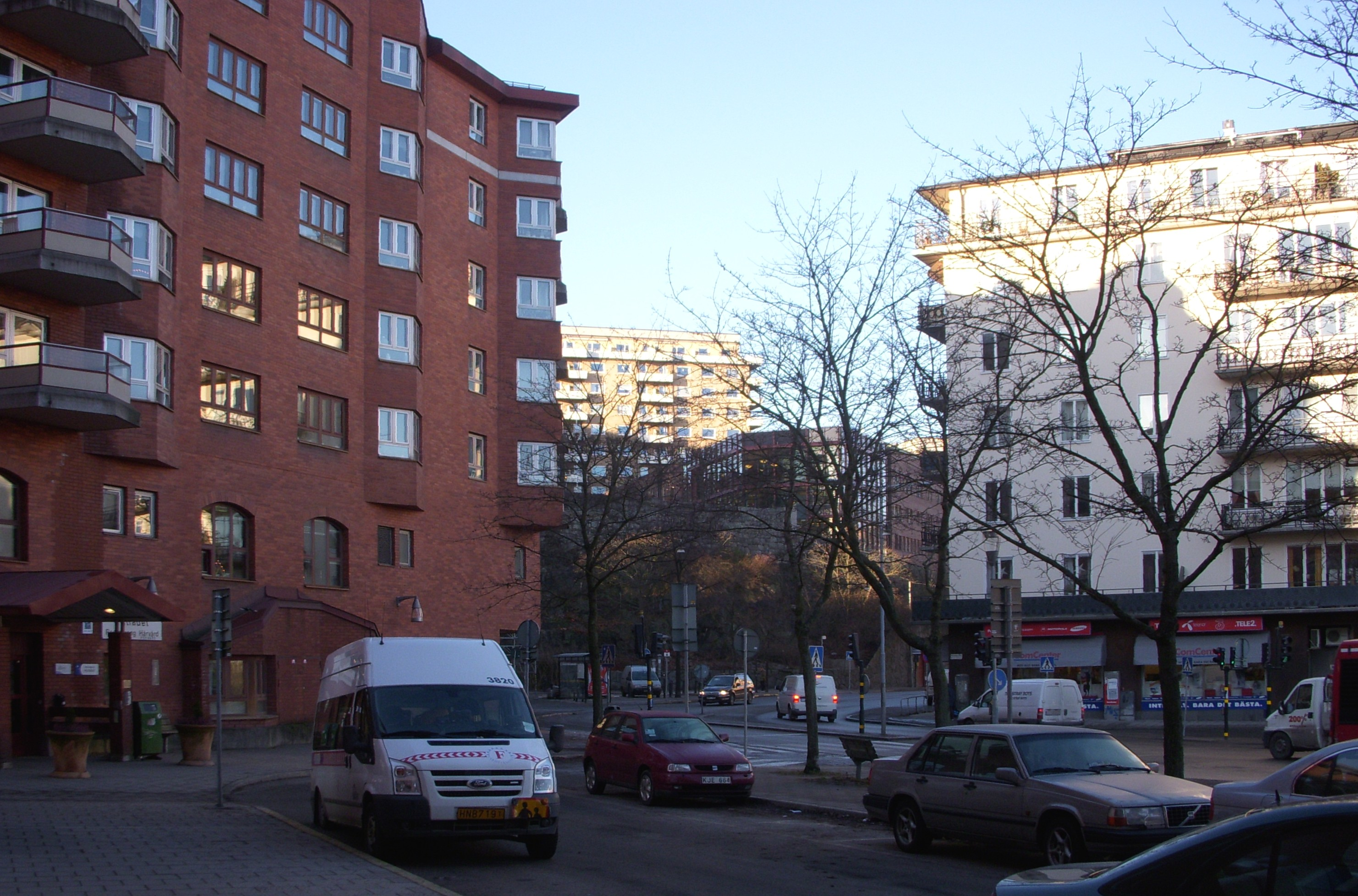 Bolinders plan i stadsdelen Kungsholmen i Stockholm